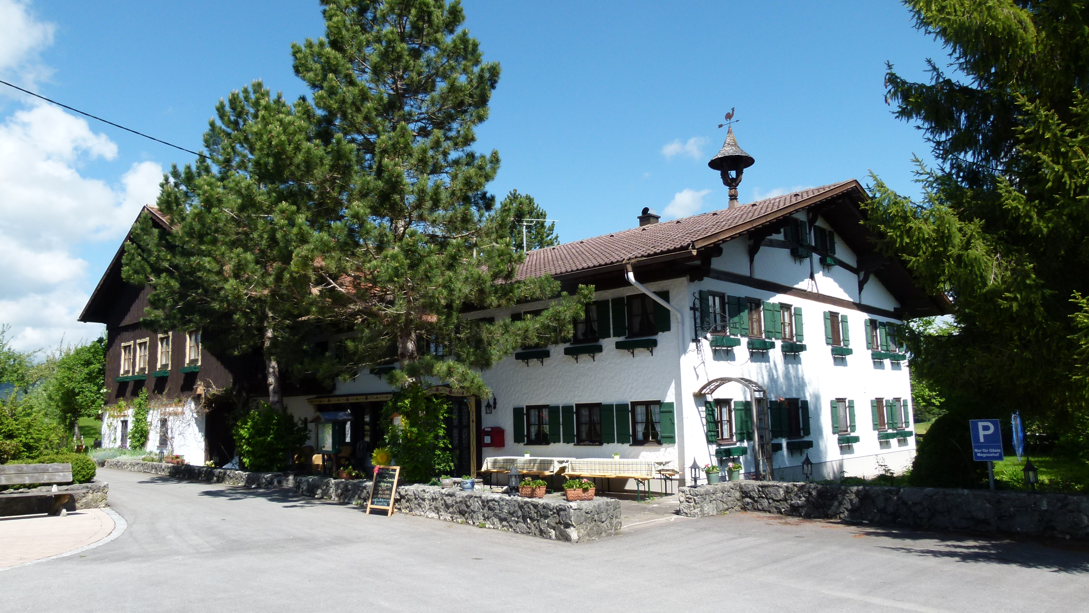 ehem. Bauernhof, jetzt sog. St. Magnushof, in Unterreuten, Gemeinde Eisenberg (Allgäu)